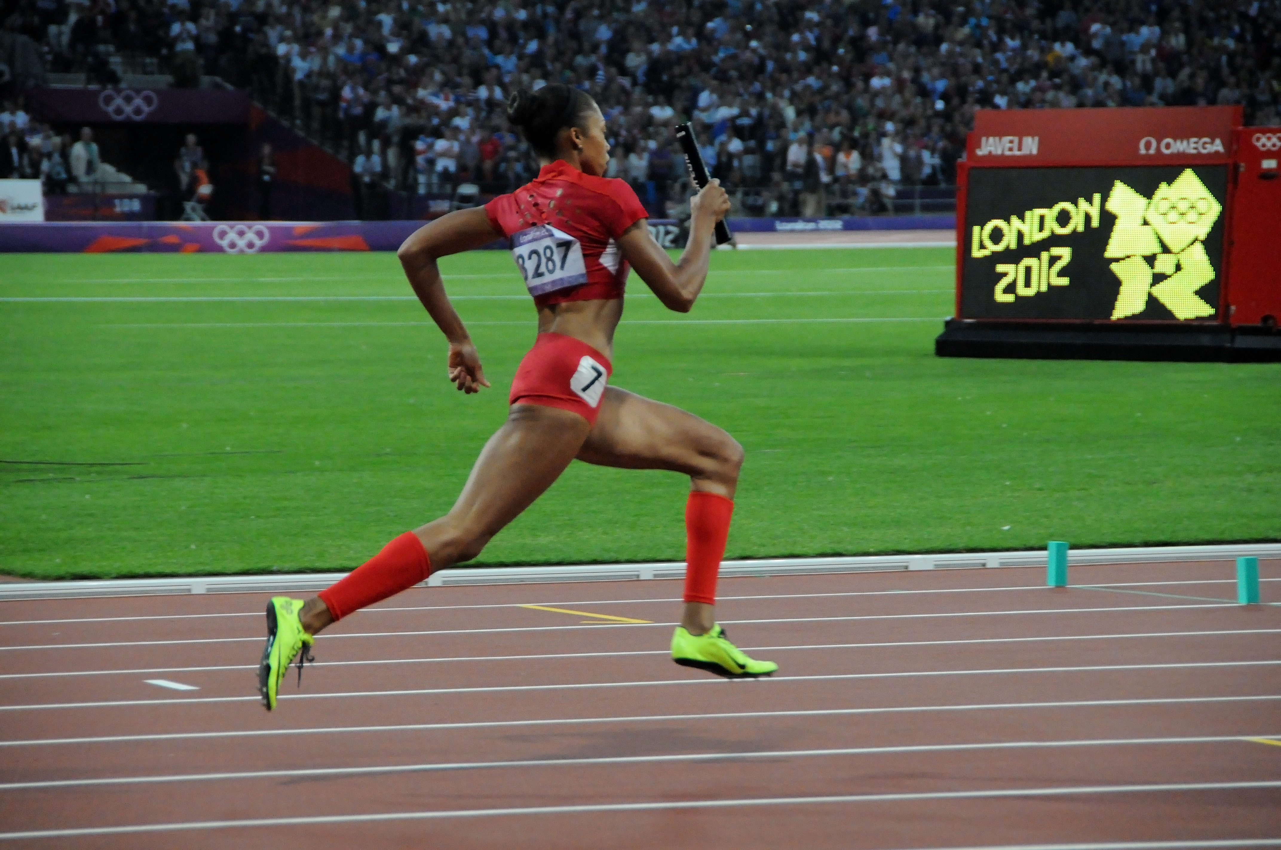 Allyson Felix courant comme deuxième relayeuse le relais américain vainqueur du 4x400 aux jeux olympiques de Londres 2012